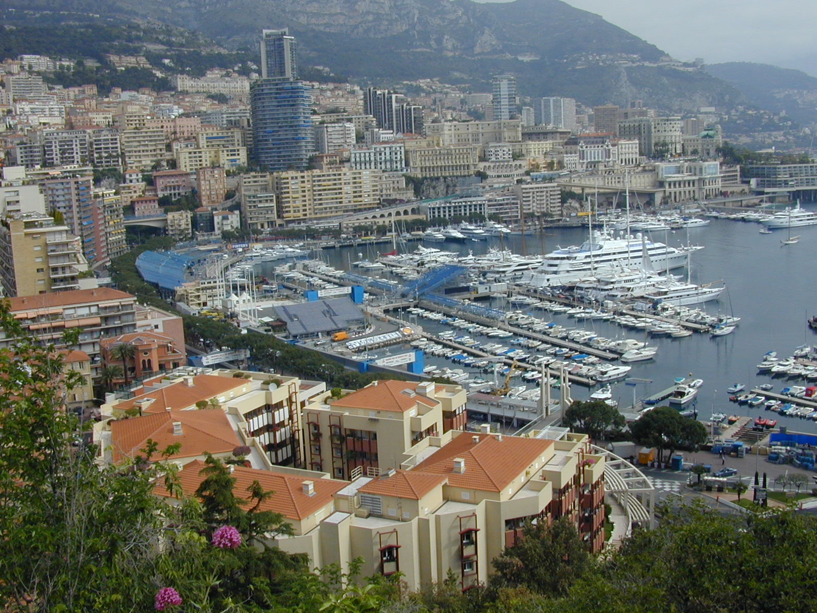 Vorbereitungen zum Großen Preis von Monaco (F1) am 26. Mai 2002